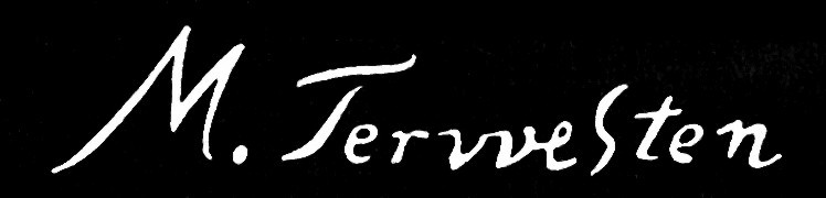 Signatur